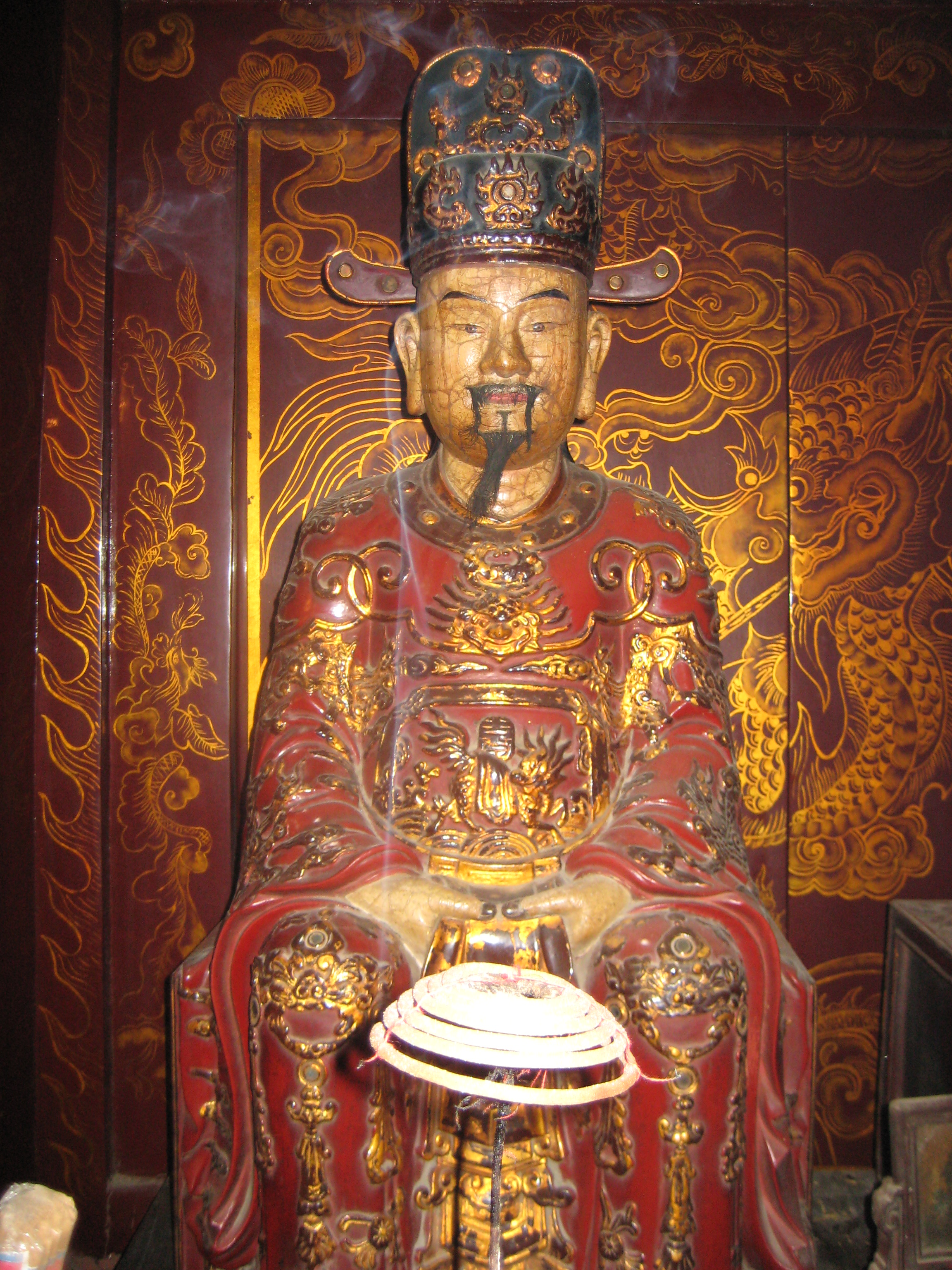 Tượng Đinh Toàn ở Cố đô Hoa Lư